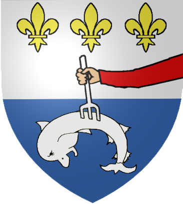 Blason des Anfossi de Taggia d'après celui situé sous les arcades de la place principale où se trouvent les blasons des familles de Taggia. D'argent, au senestrochère de gueules, armé d'un trident frappant un dauphin d'argent nageant dans une mer d'azur, acc. de trois fleurs-de-lis d'or rangées en chef. Casque de front. Pasquale Anfossi, compositeur [1] 1727-1797 Filippo Anfossi, Dominicain [2] ?-1825 Paolo Anfossi, heros de l'indépendance italienne, 1804-1844 Nataraja Source Blason reconstitué par Rinaldum d'après [3] avec Paint et Blender Statut Double licence : GFDL et GPL Rinaldum